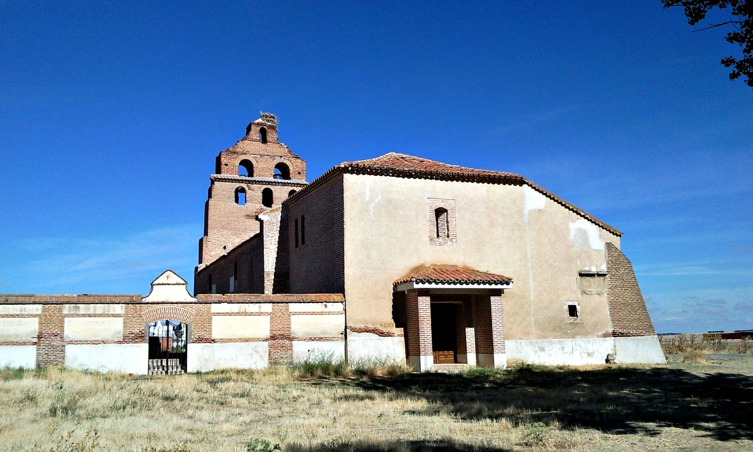 Iglesia de Albornos (ruta Daganzo-Narros)